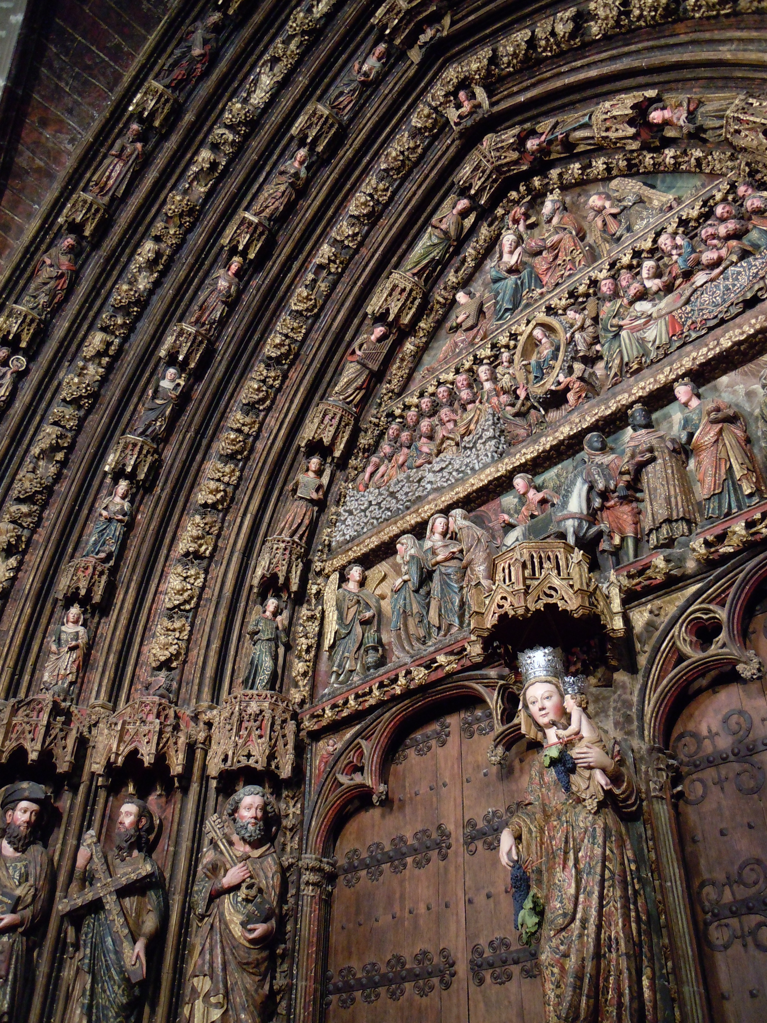 Iglesia de Santa María de los Reyes, Laguardia, Álava (Spain).